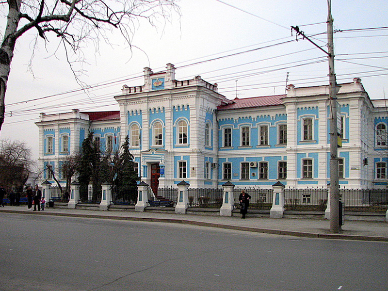 Во время Великой Отечественной войны в этом здании хранилась мумия В.И. Ленина. А до революции в этих окрестностях мёл улицы ссыльный грузин-революционер Иосиф Джугашвили.